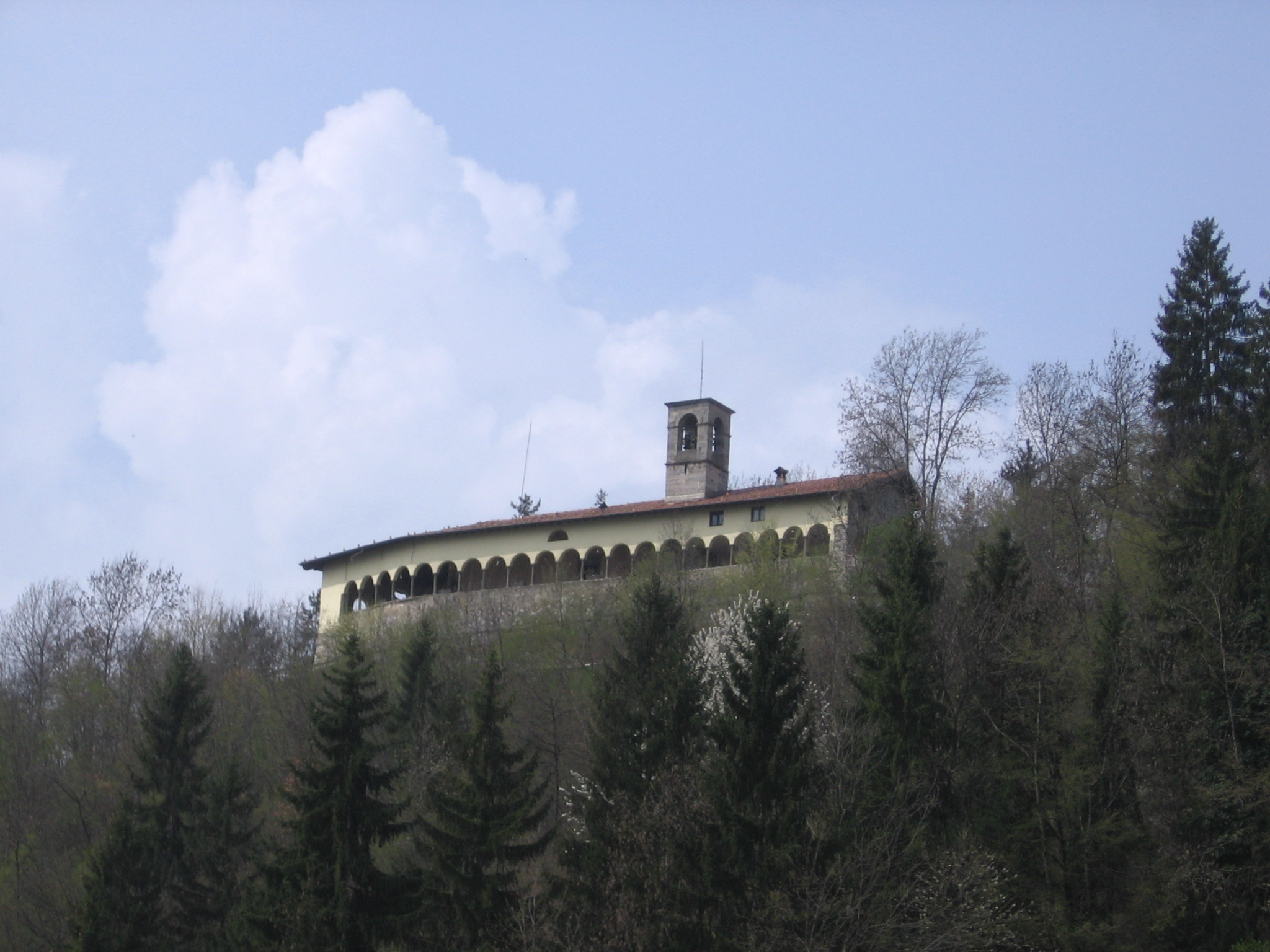 Parre, Bergamo, Italia